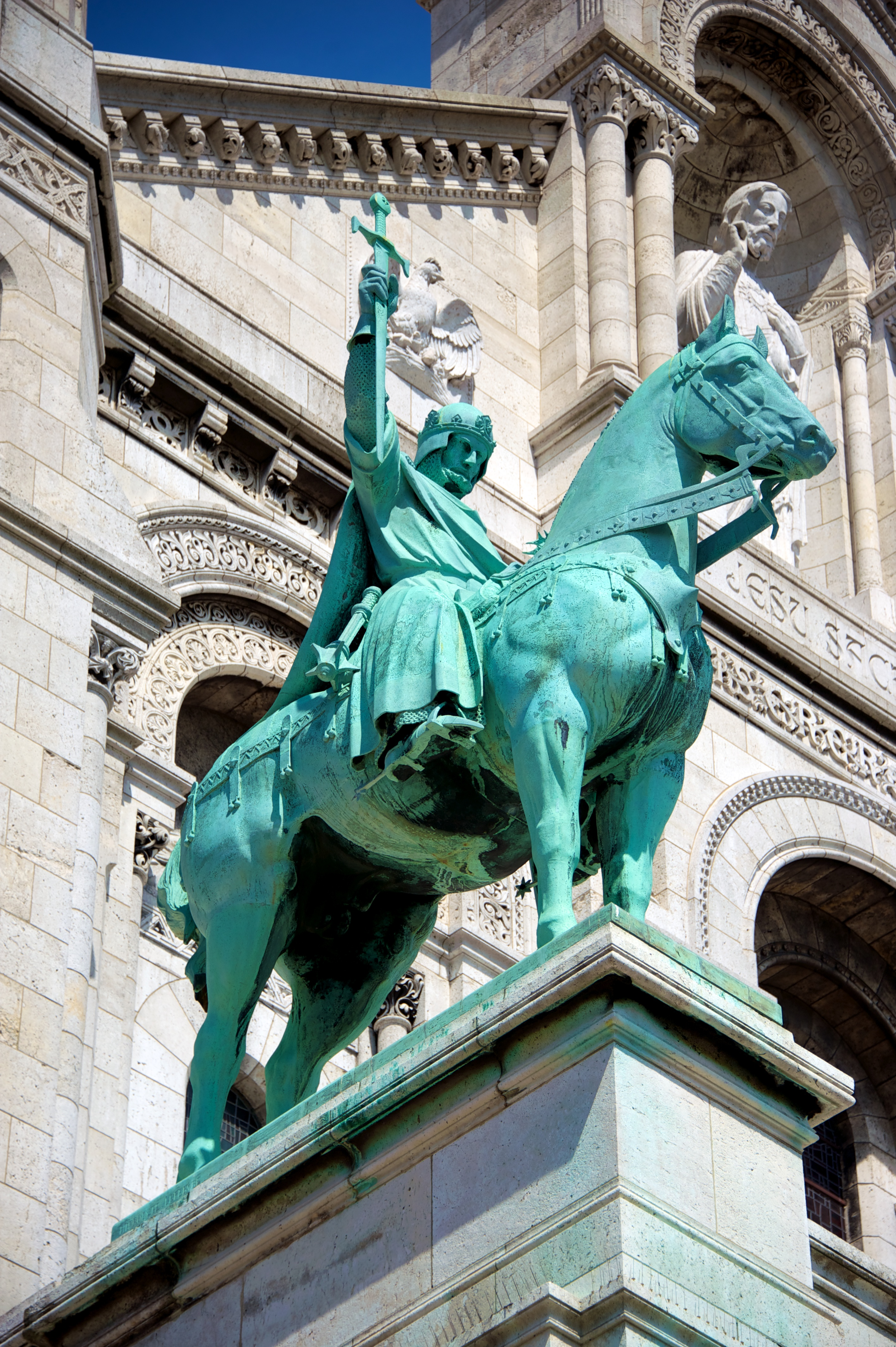 Exterior of the Basilique du Sacré-Cœur de Montmartre